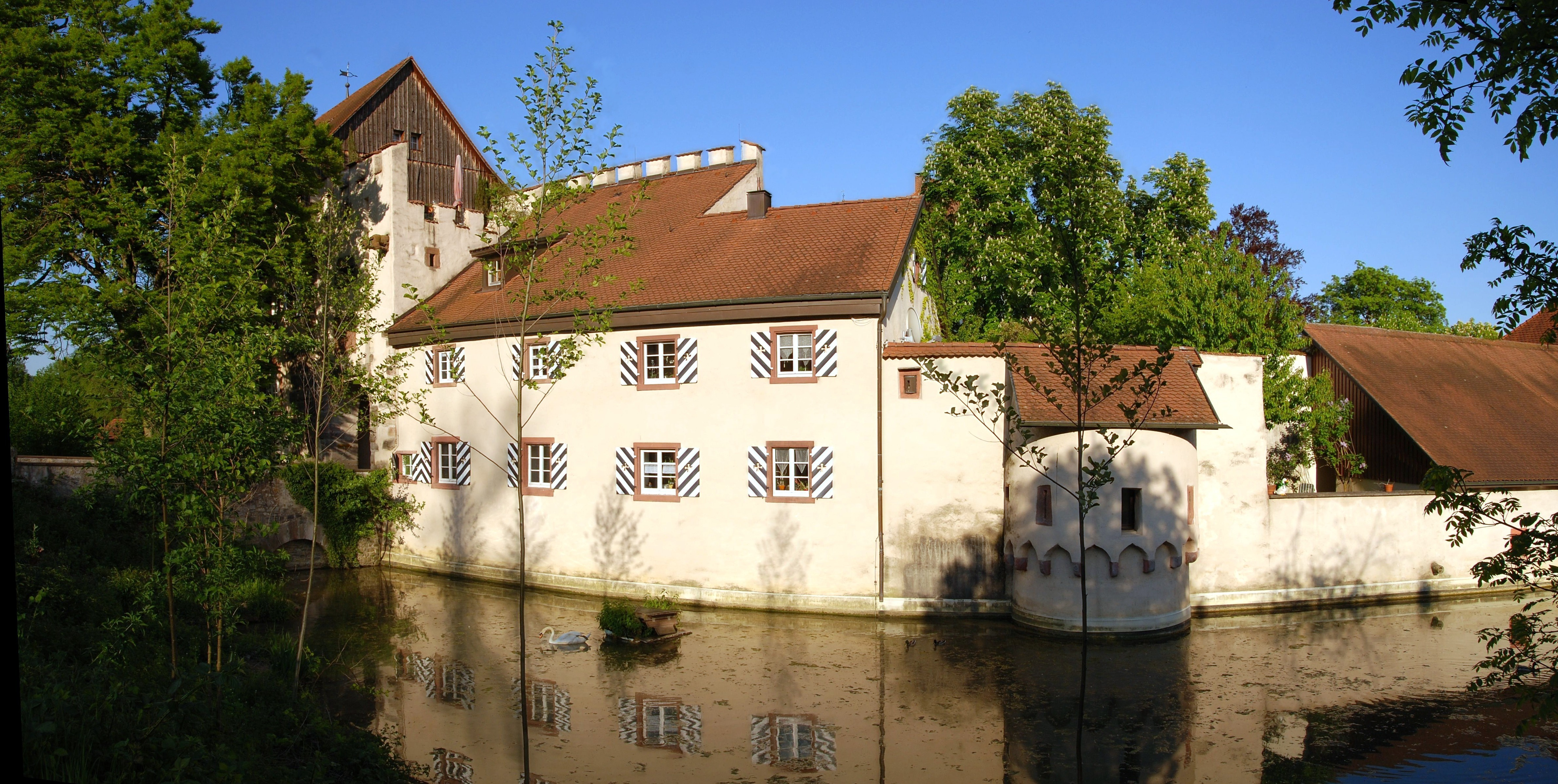 Schloss Beuggen: Torhaus von der Westseite mit Bach (Eingangsbereich)